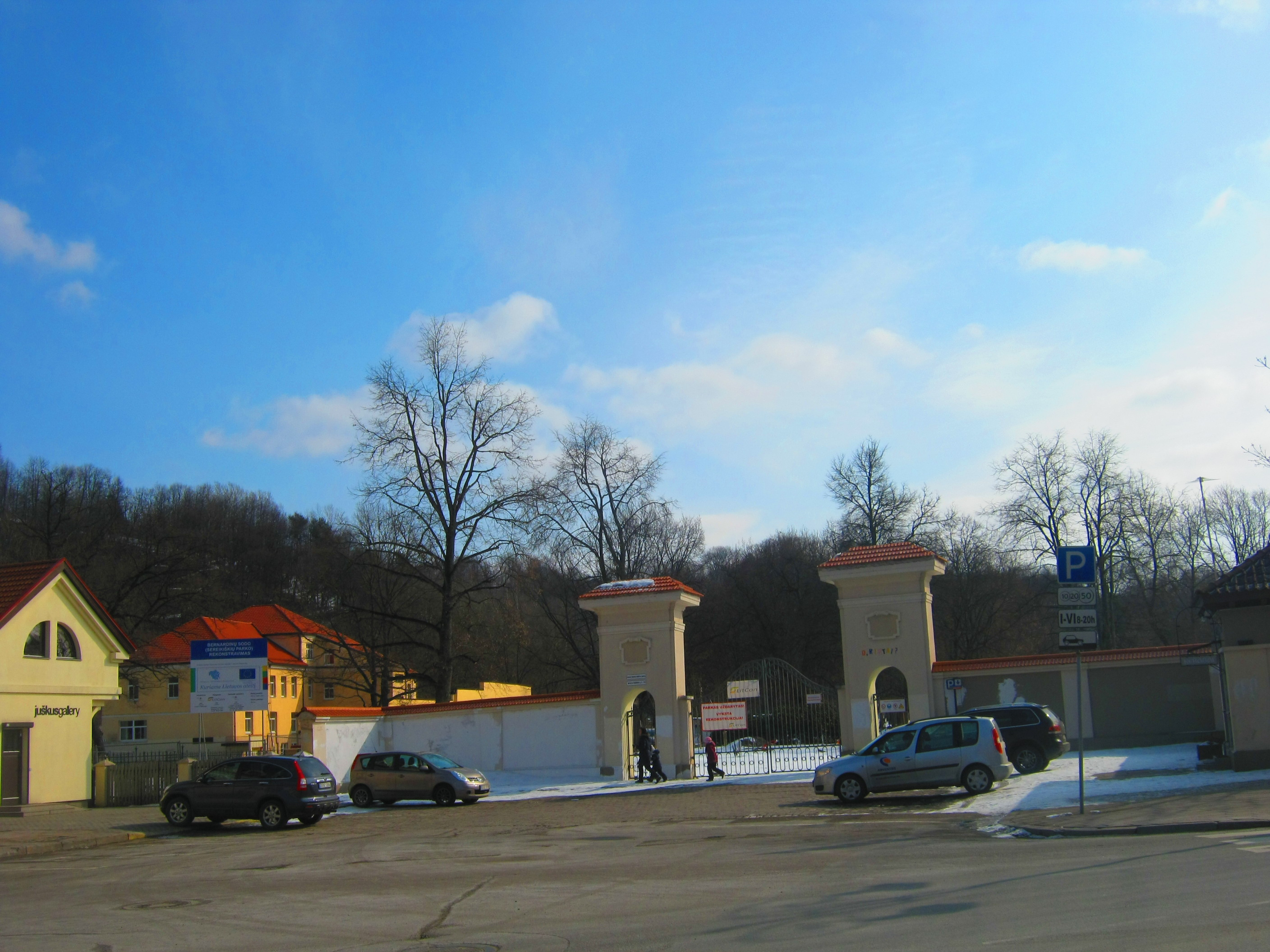 Bernardinų sodas (Sareikiškių parkas)